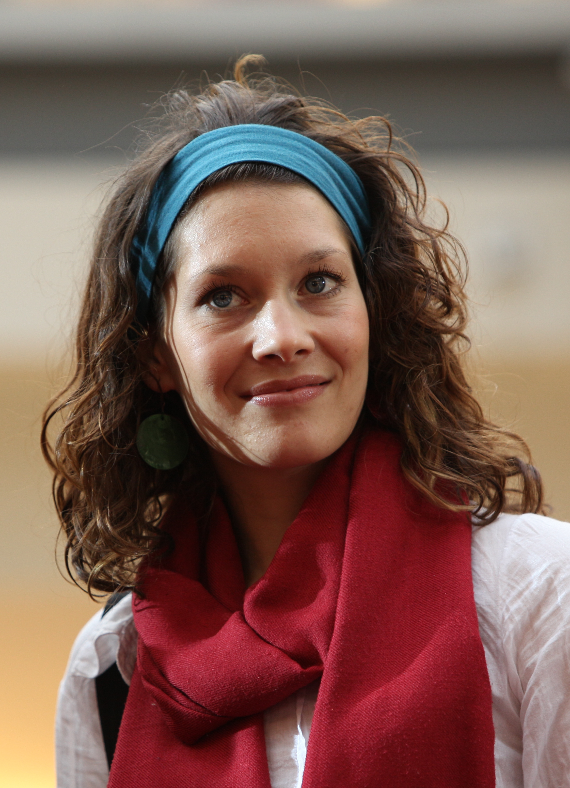 Barbora Seidlová při vernisáži výstavy k 10. ročníku Brněnských shakespearovských dnů